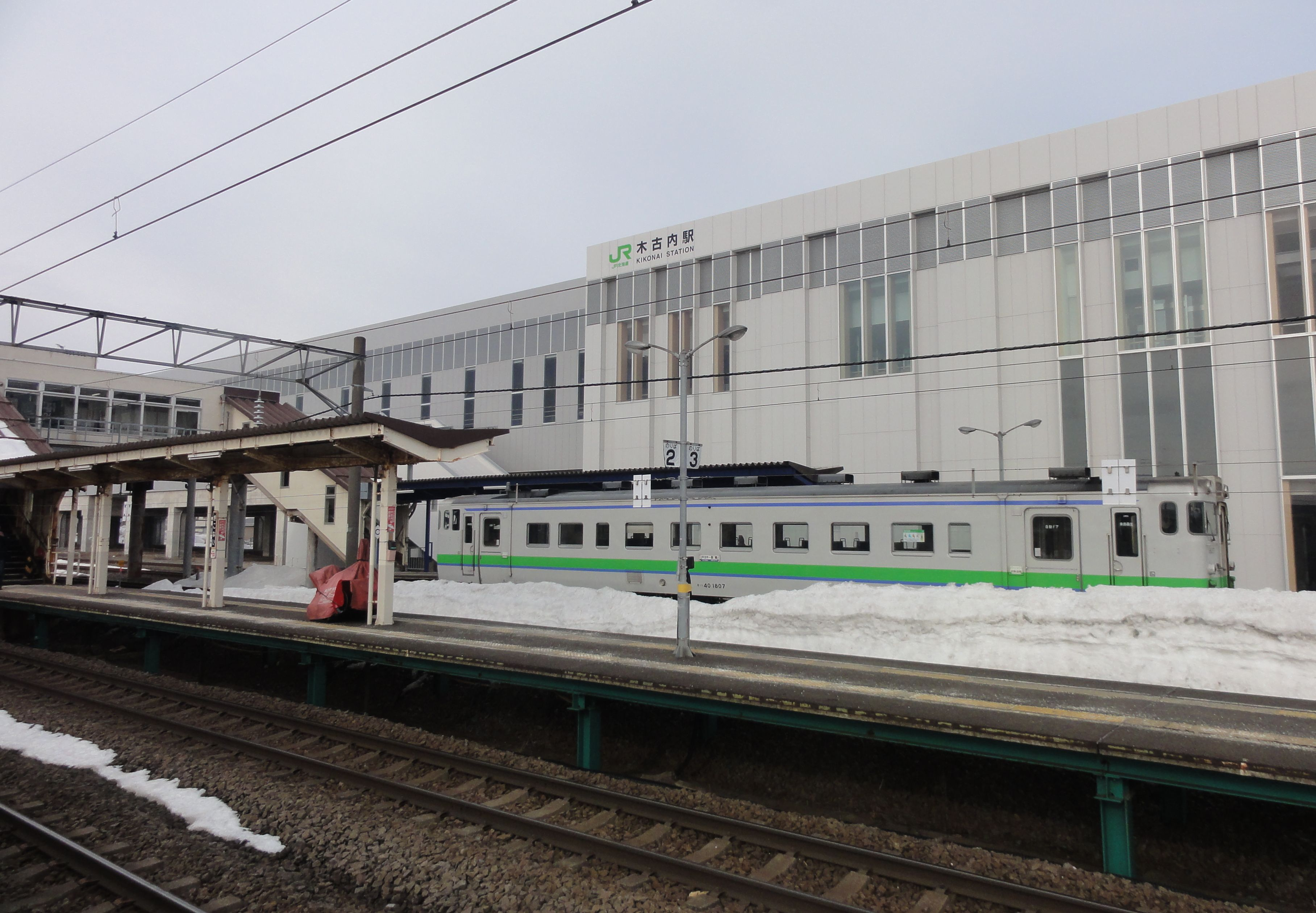 津軽海峡線・木古内駅